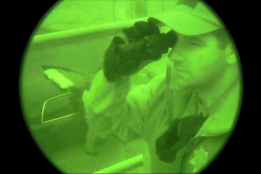 Obraz generowany z noktowizora Gen. Core